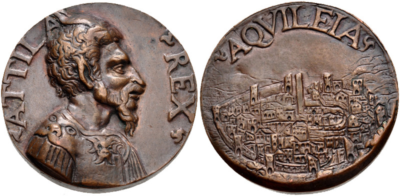 Medalha do século XVII retratando Átila no anverso e a cidade de Aquileia, na Itália, no reverso.